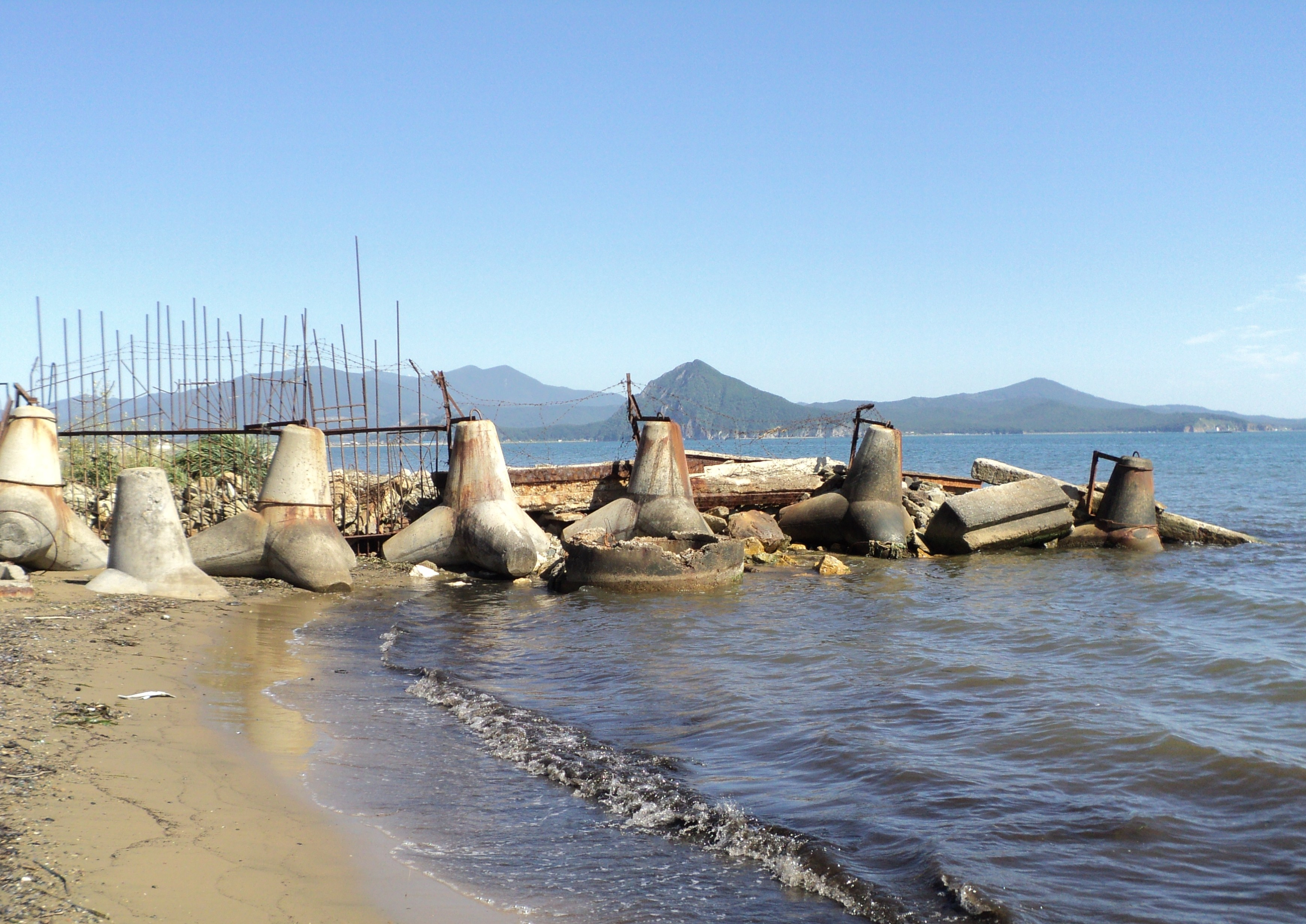 Недостроенный пирс в заливе Находка